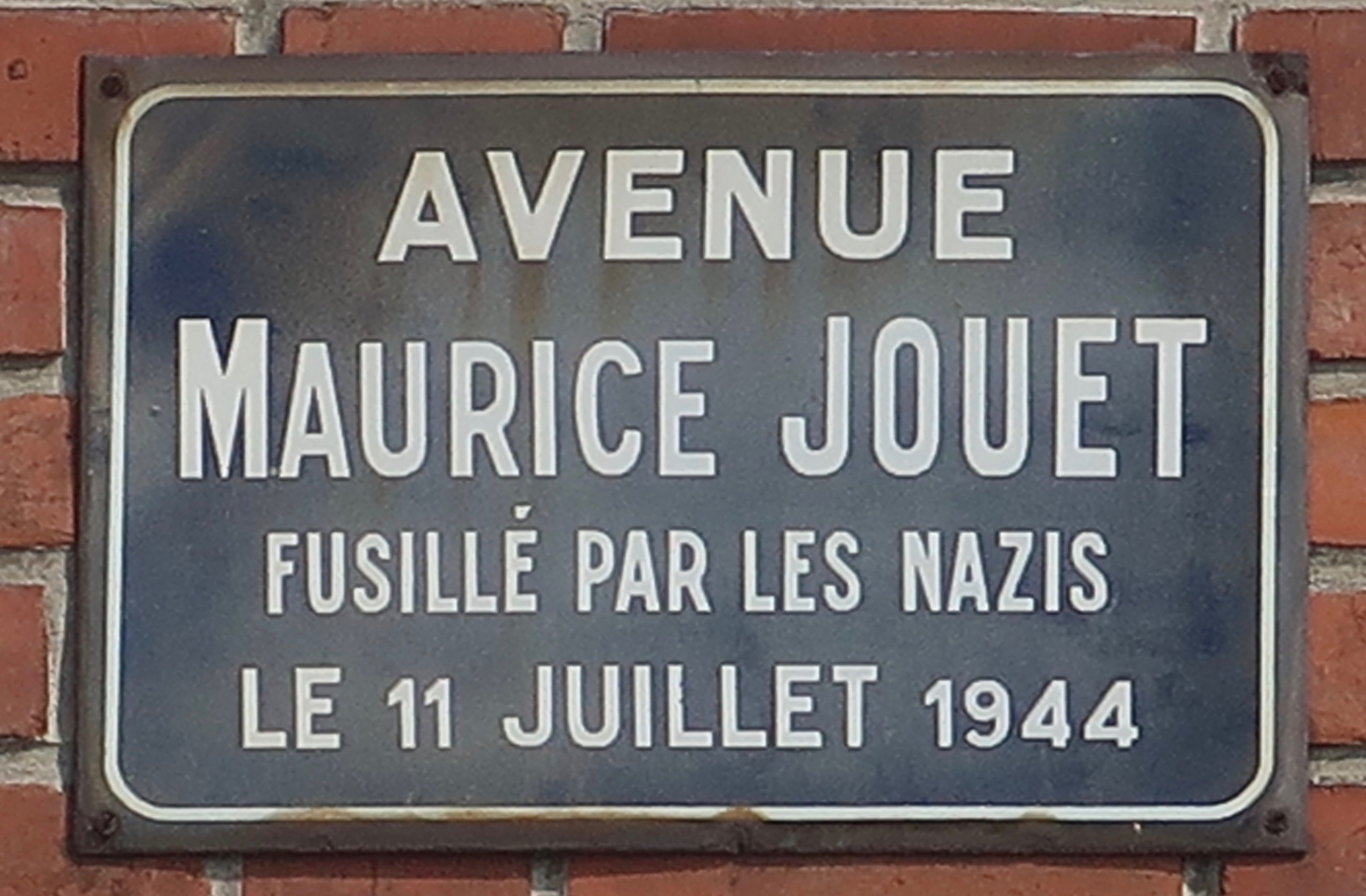 Plaque en hommage à Maurice Jouet, fusillé par les Nazis en 1944, 50 rue Maurice-Jouet, Les-Clayes-sous-Bois (Yvelines).